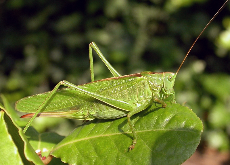 Heupferd, Tettigonia viridissima, Schlangenbad, Hessen, Germany